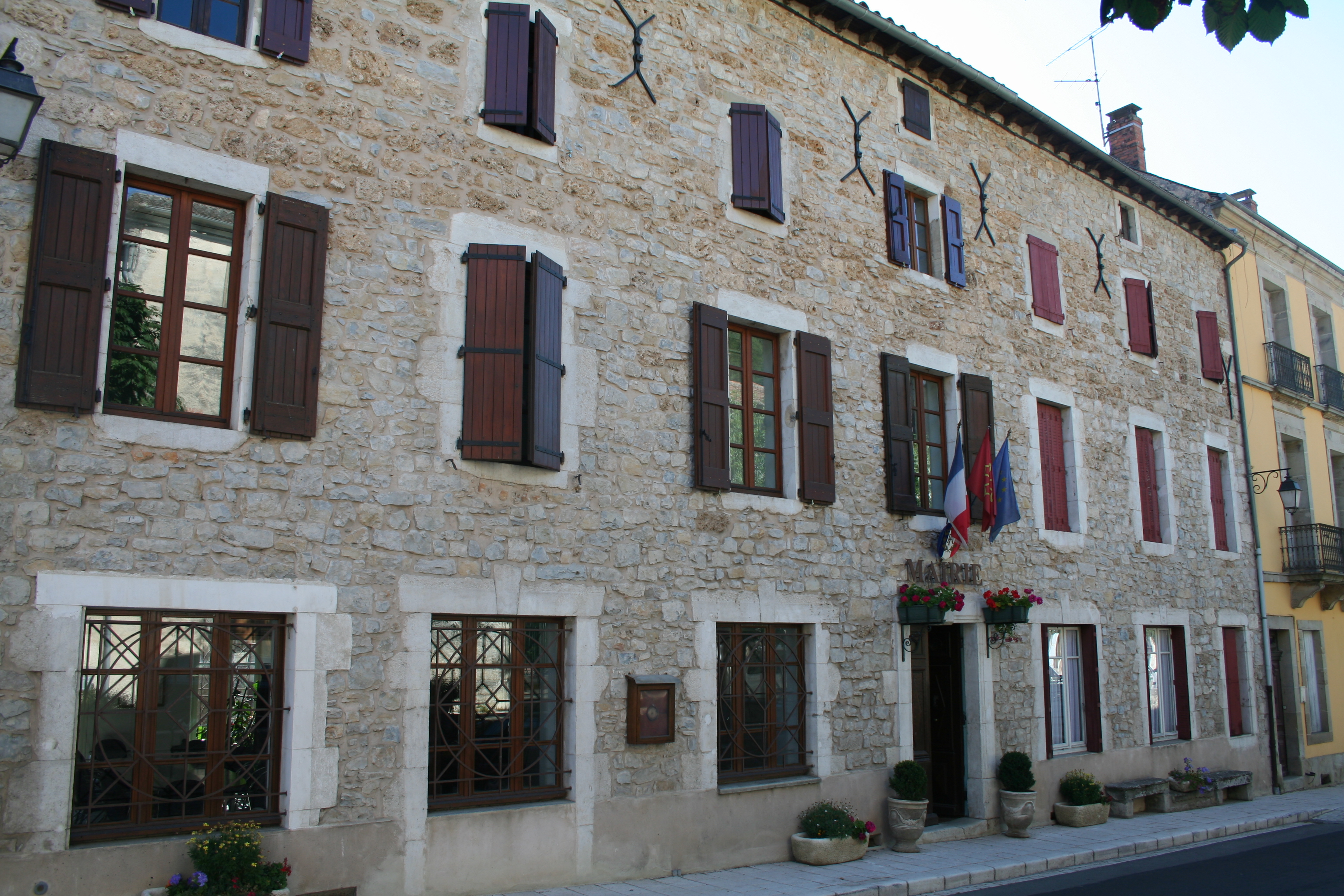 Cornus (Aveyron) - mairie.